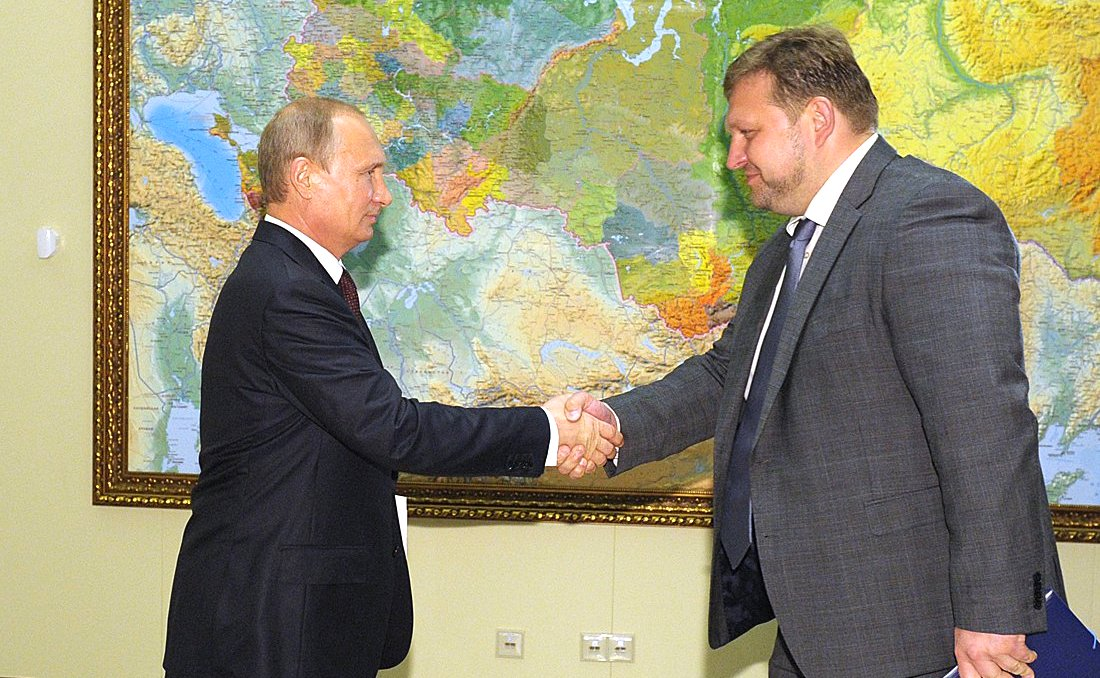 Рабочая встреча Президента России Владимира Путина с временно исполняющим обязанности губернатора Кировской области Никитой Белых